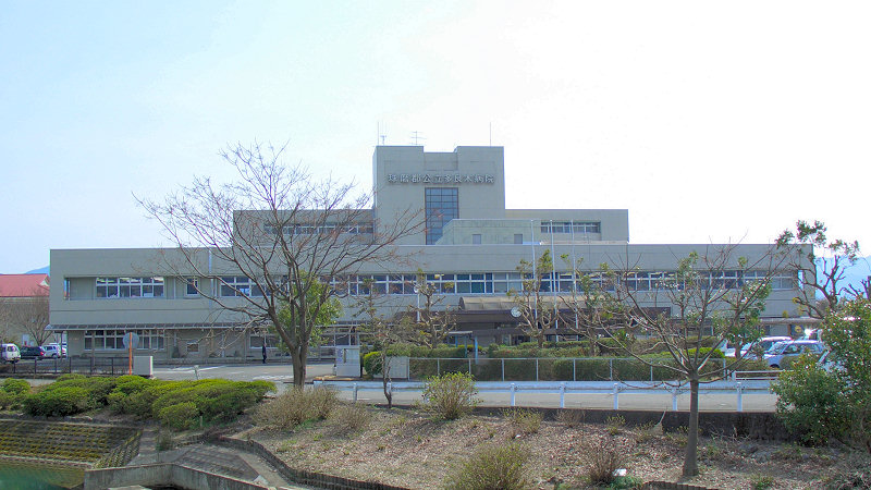 球磨郡公立多良木病院 外観 撮影者/著者/著作権保有者 : MK Products (本人がアップロード) 撮影日 : 2007/03/22 公立病院前駅用にアップロードした画像です。良い画像があれば別の画像に変えてください。